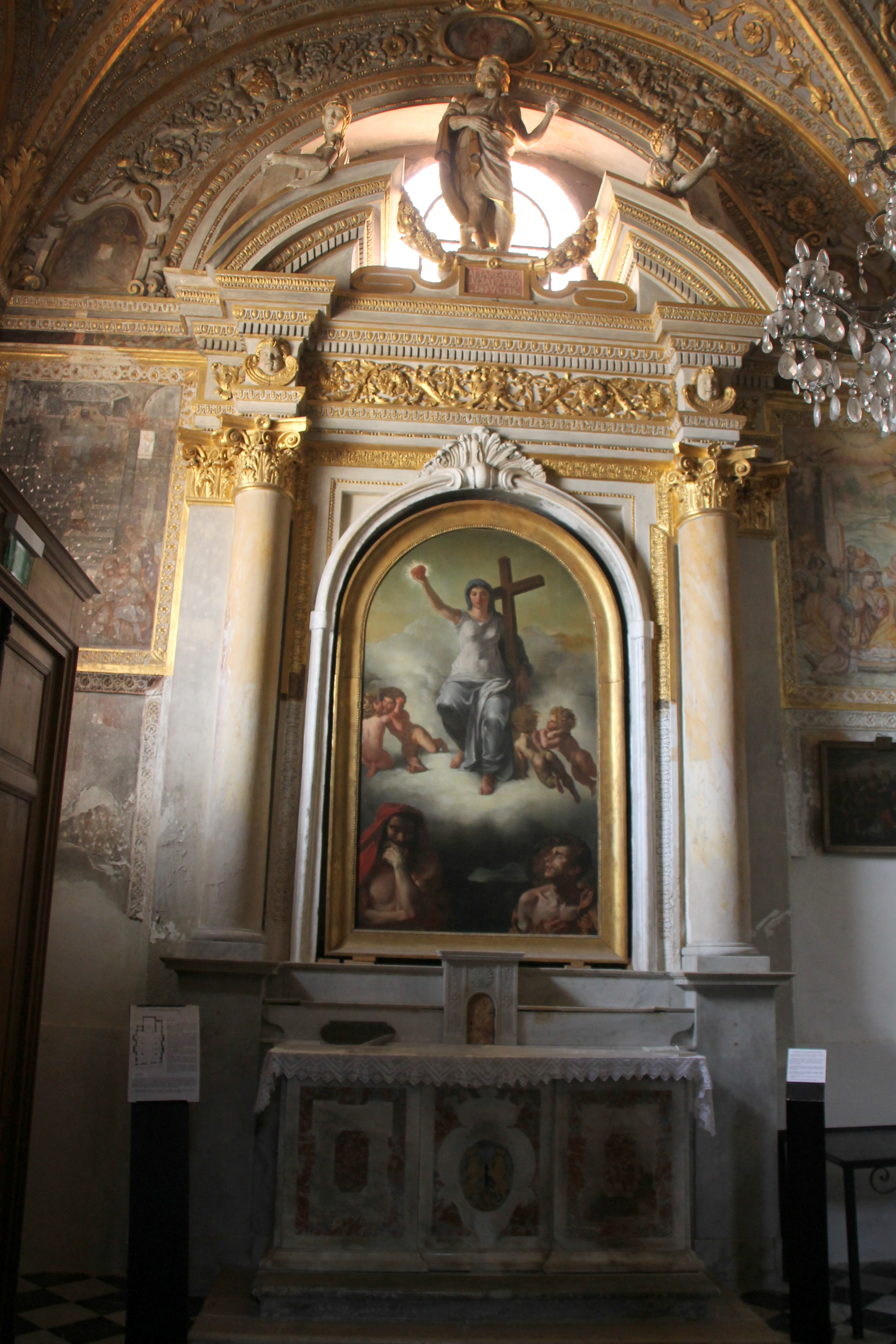 Kathedraal van Ajaccio - kapel van de Madonna van Pianto